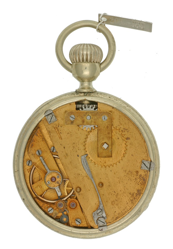 Taschenuhr "La Prolétaire", G. F. Roskopf, La-Chaux-de-Fonds, um 1870 (Deutsches Uhrenmuseum, Inv. 2004-050)